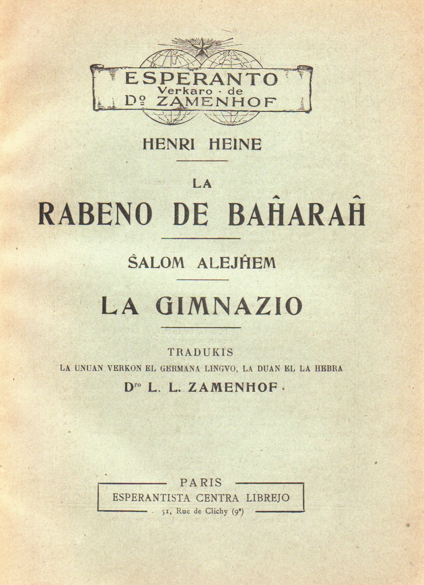 librokovrilo de " La Rabeno de Baĥaraĥ & La Gimnazio", 1924